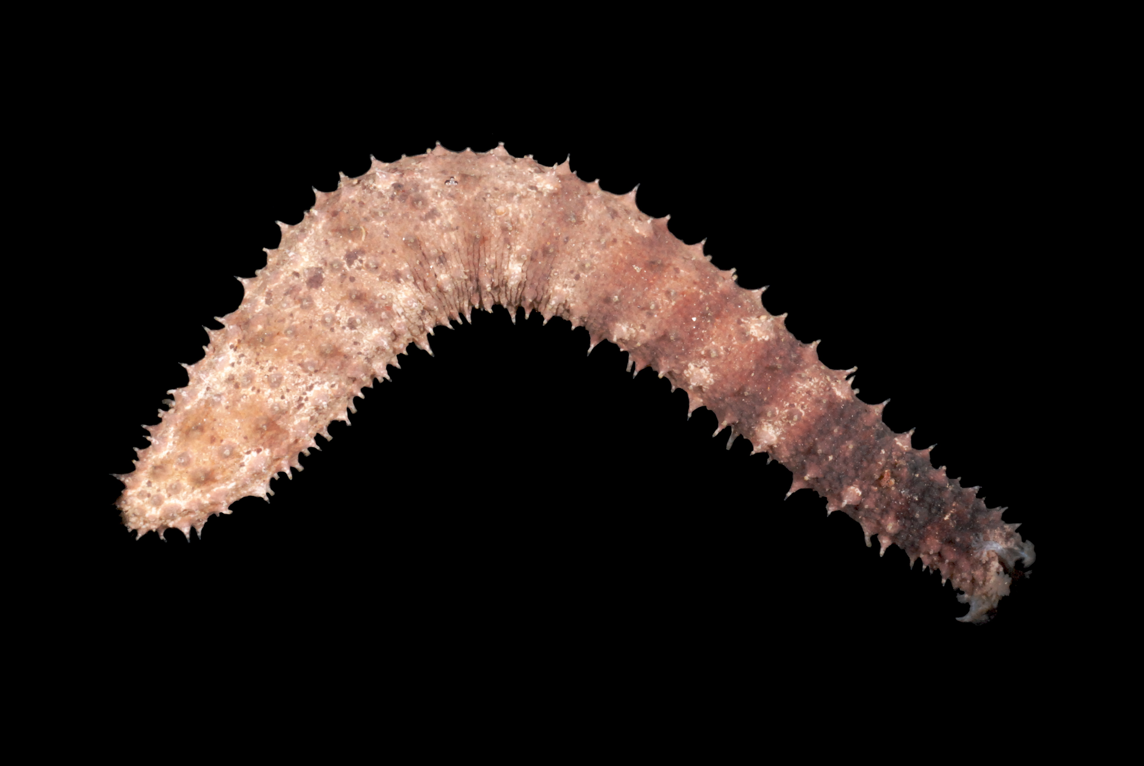 Holothuria impatiens. La Réunion.